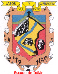 Escudo de Armas de Ixtlán del Río